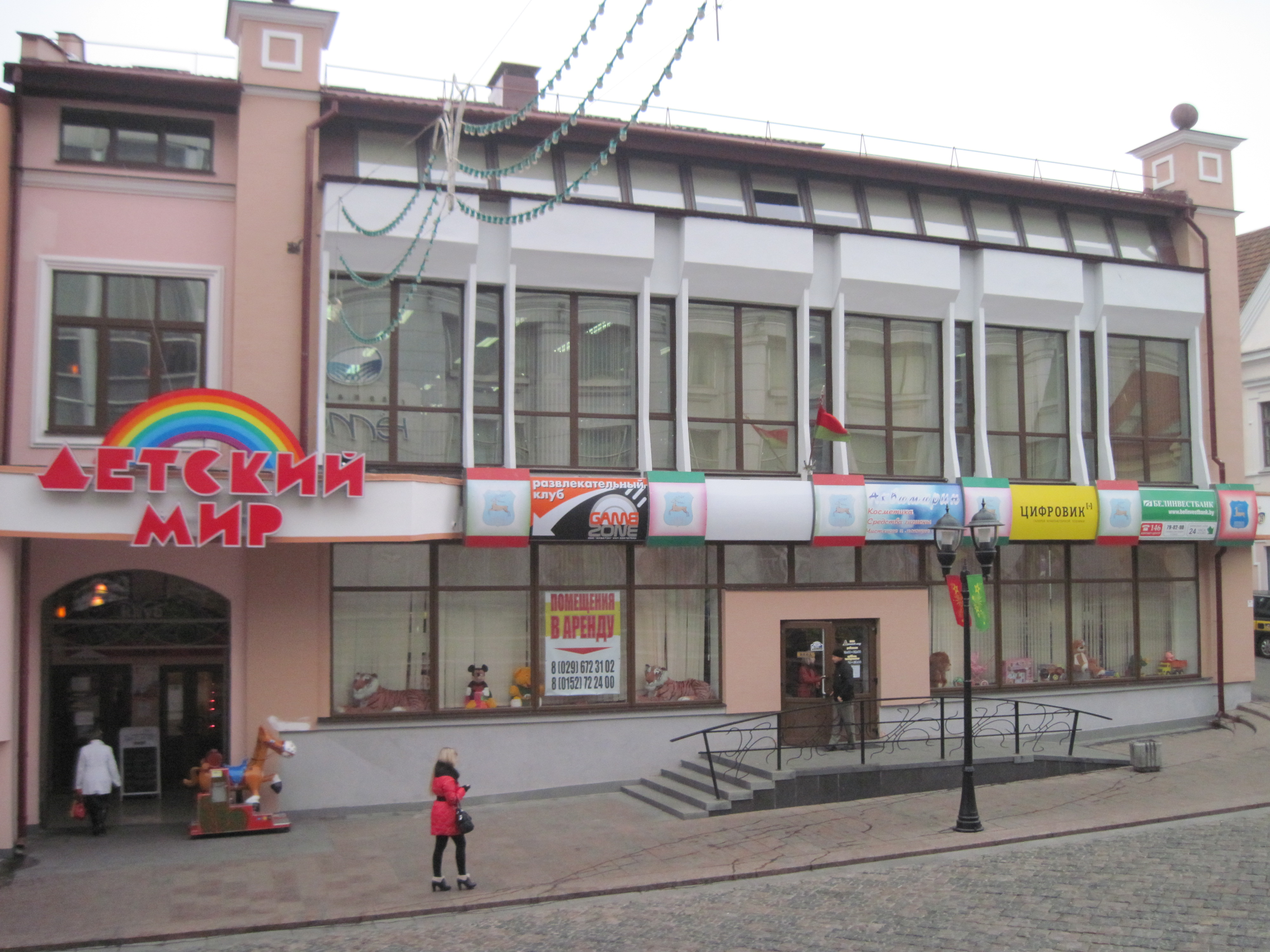 Беларуская (тарашкевіца): Фота дома па вул. Савецкая, 29, Гродна